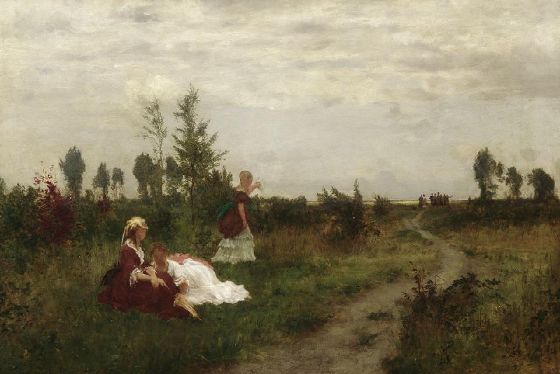 Weite Heidelandschaft mit rastenden Frauen